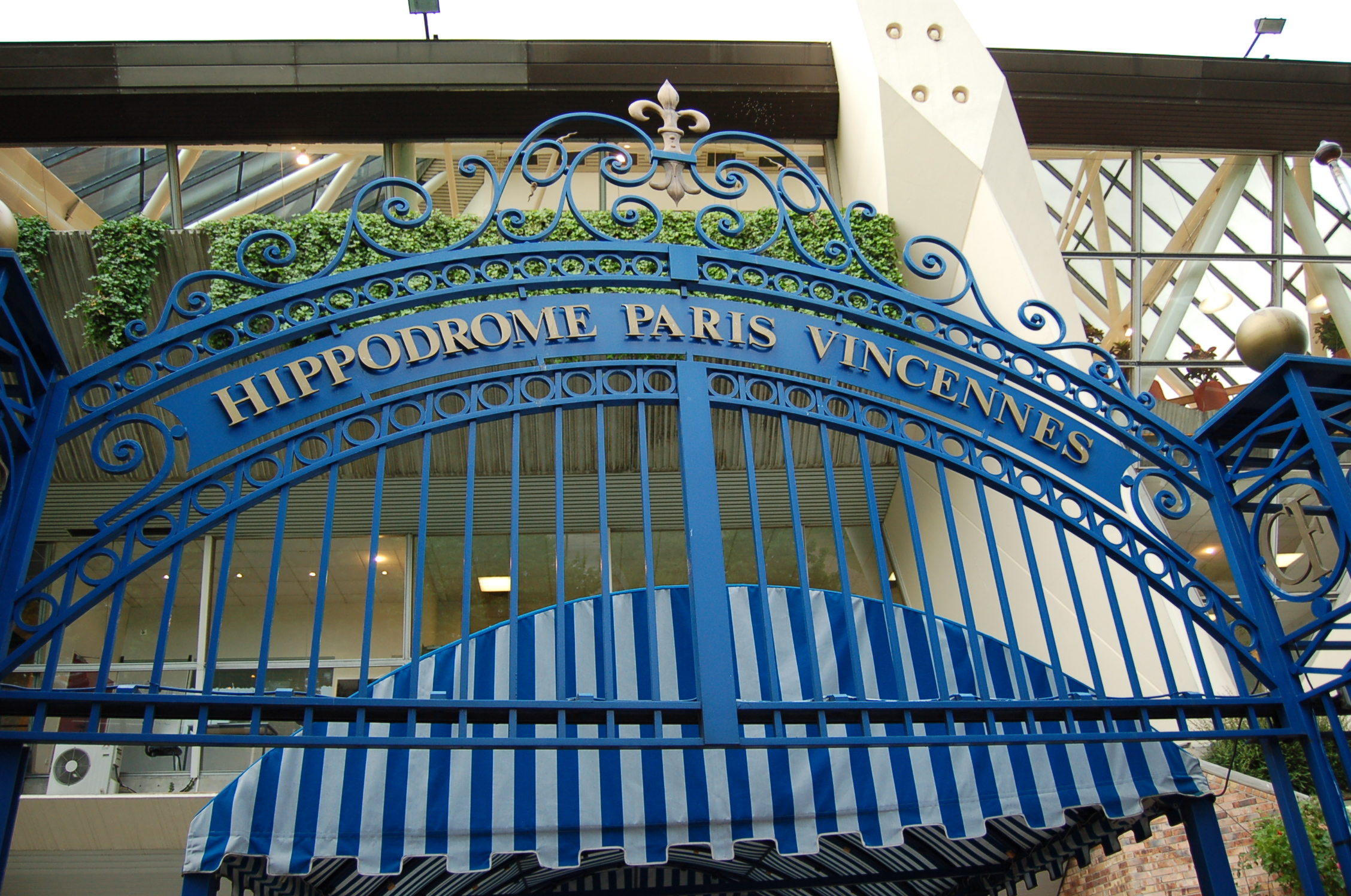 Entrée de l'Hippodrome de Vincennes.